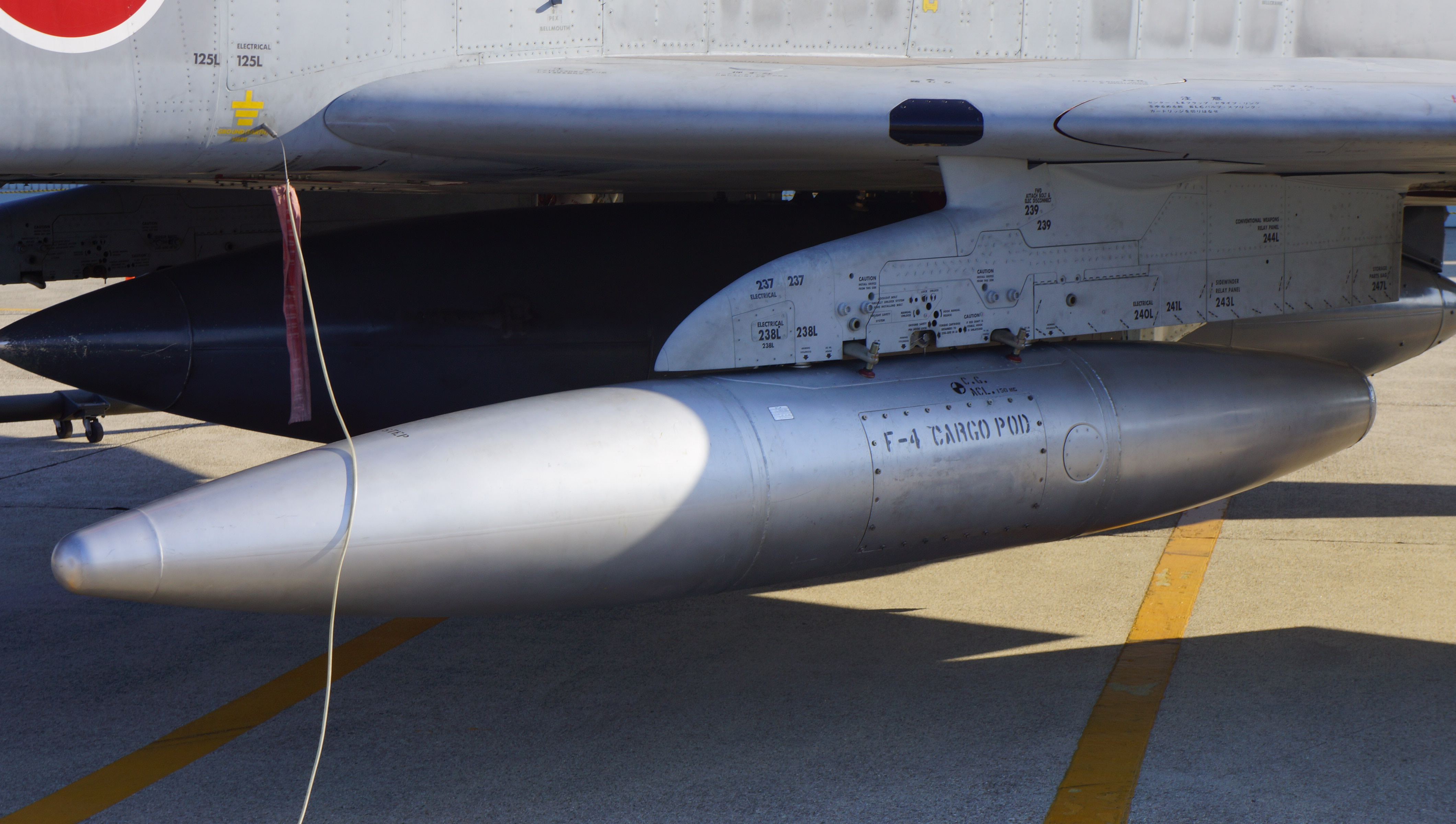 航空自衛隊 F-4EJ搭載汎用カーゴポッド（トラベルポッド）。 14年2月23日 航空自衛隊小牧基地にて。